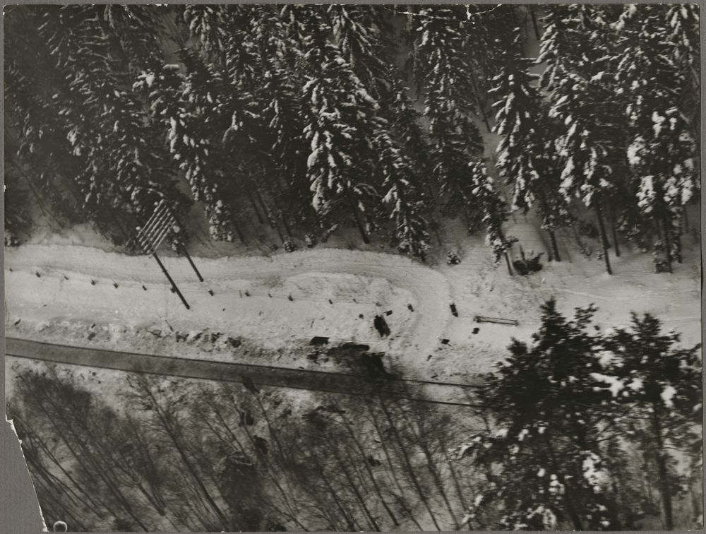 Olycksplatsen Kinstabyn 22 januari 1951